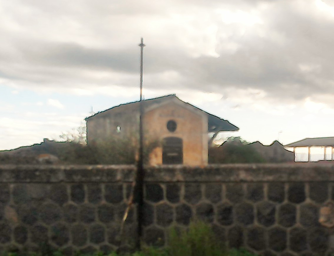 Magazzino merci dell'ex stazione ferroviaria della linea Motta Sant'Anastasia-Regalbuto di Schettino-Santa Maria di Licodia.